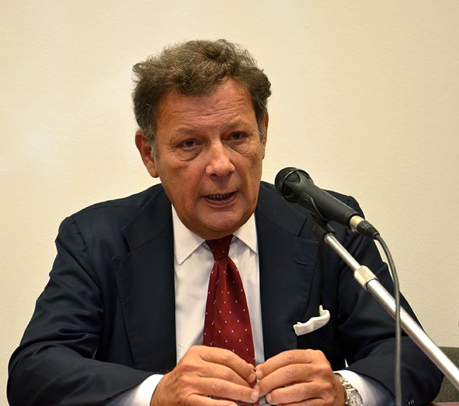 Francesco Dal Co, direttore della rivista Casabella (Mondadori).